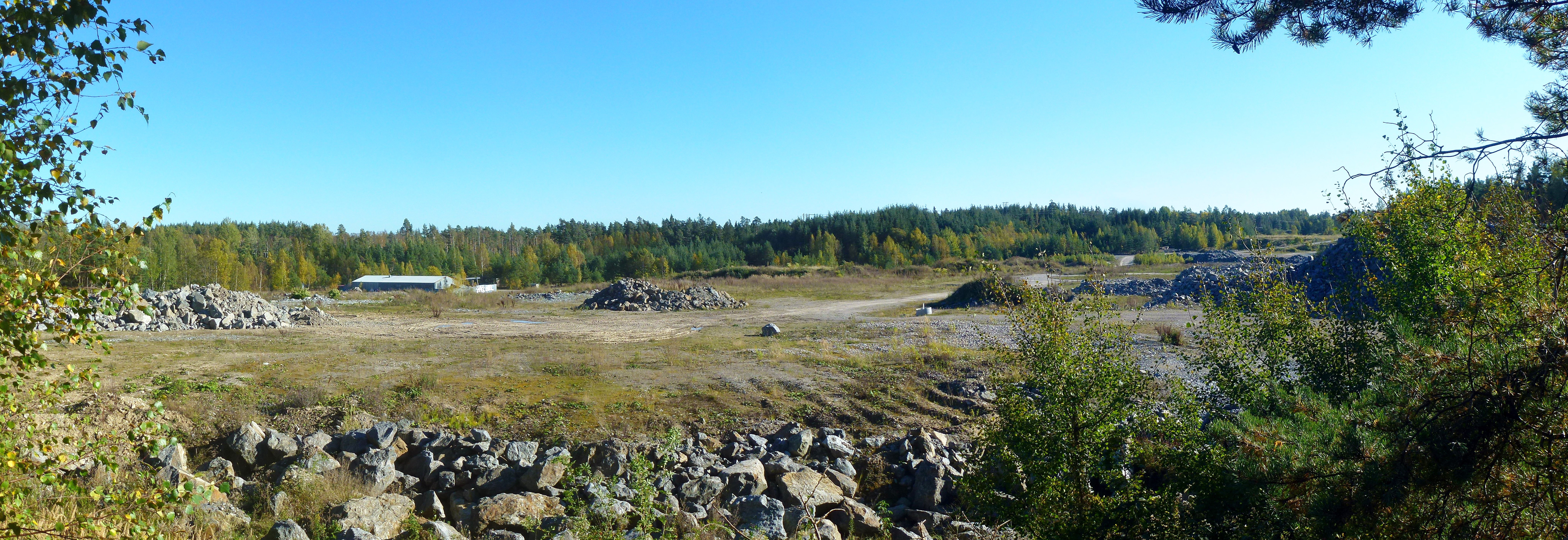 Ältas framtida bostadsområde "Ältadalen" sedd från nordväst